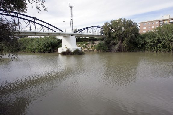 RIO JUCAR A SU PASO POR ALBALAT DE LA RIBERA.